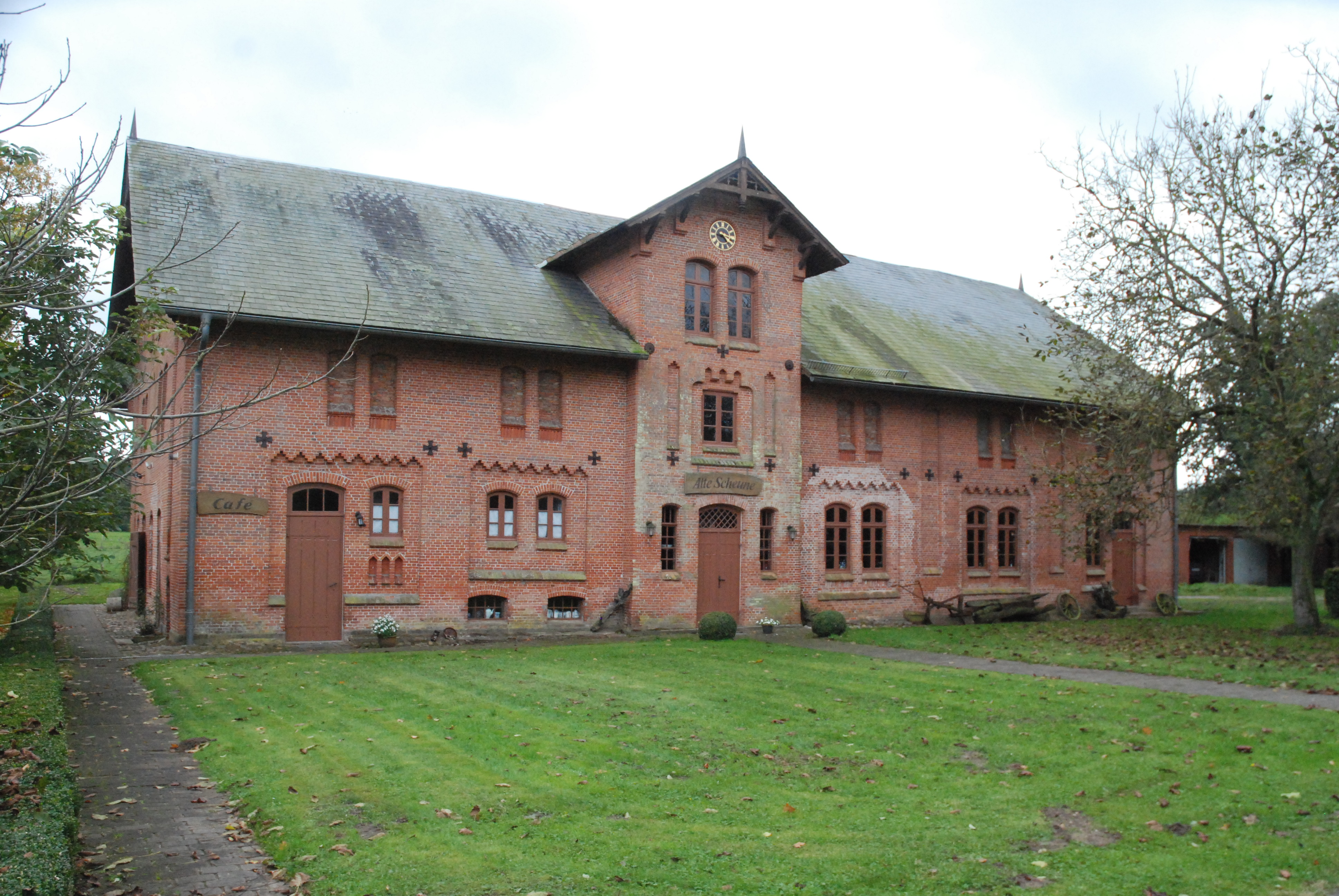 Scheune auf der Gutsinsel